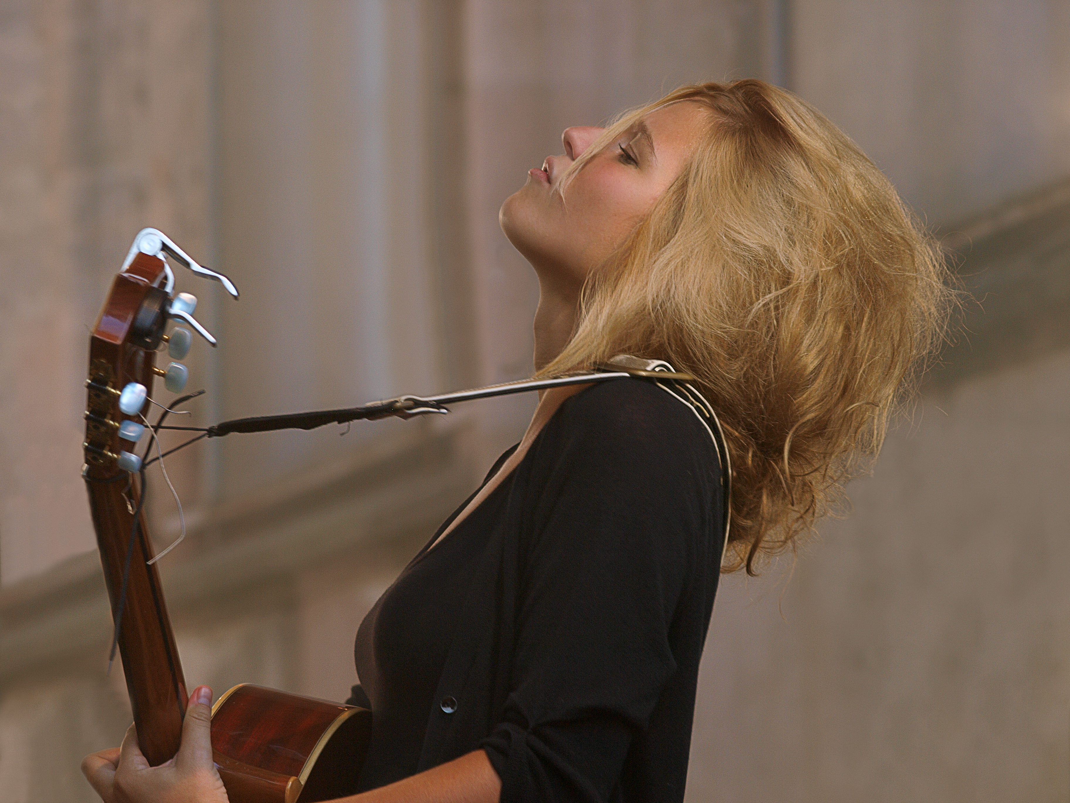 Selah Sue live beim Bardentreffen 2010 in Nürnberg